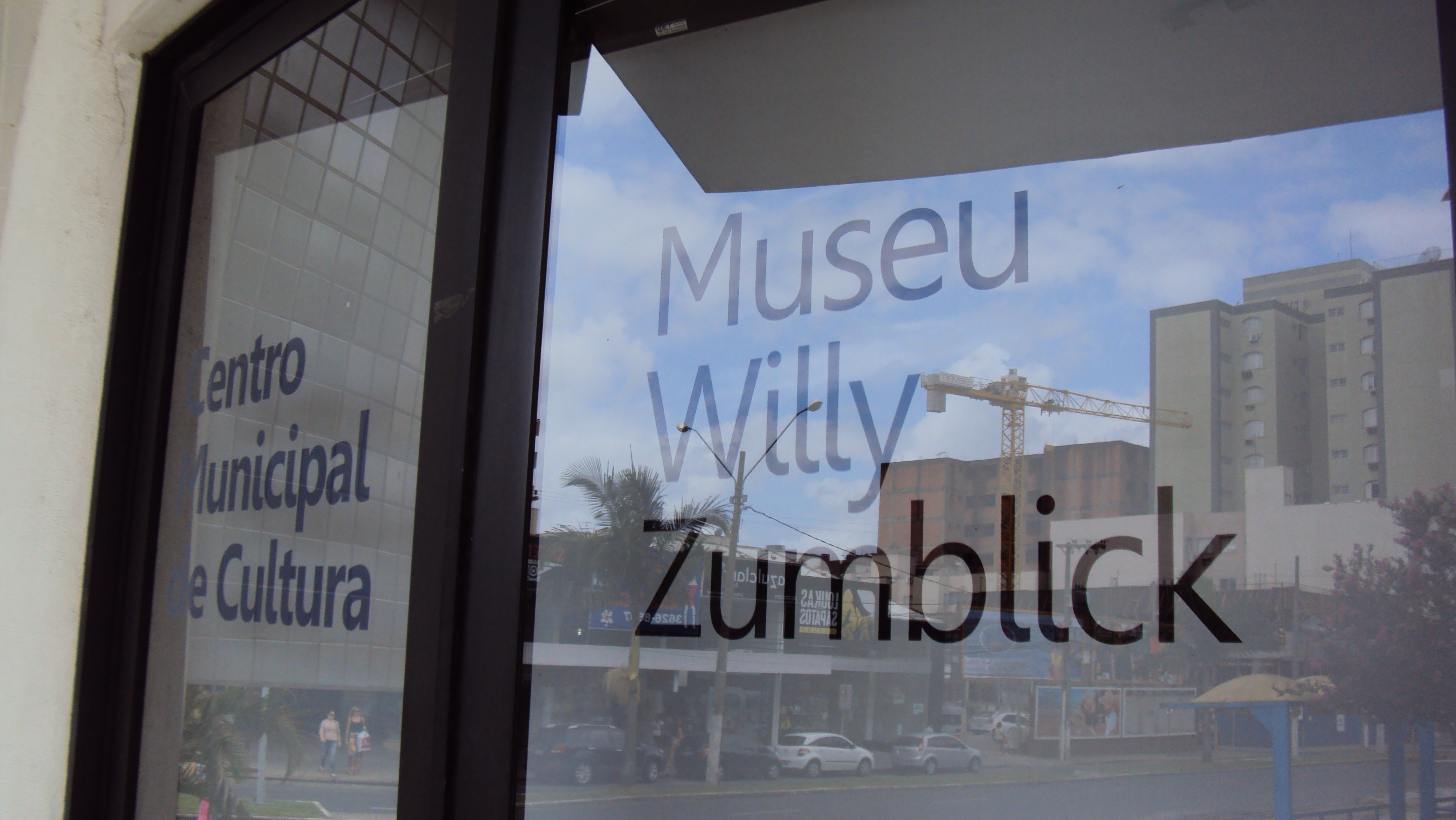 Portão de acesso ao Museu Willy Zumblick em Tubarão